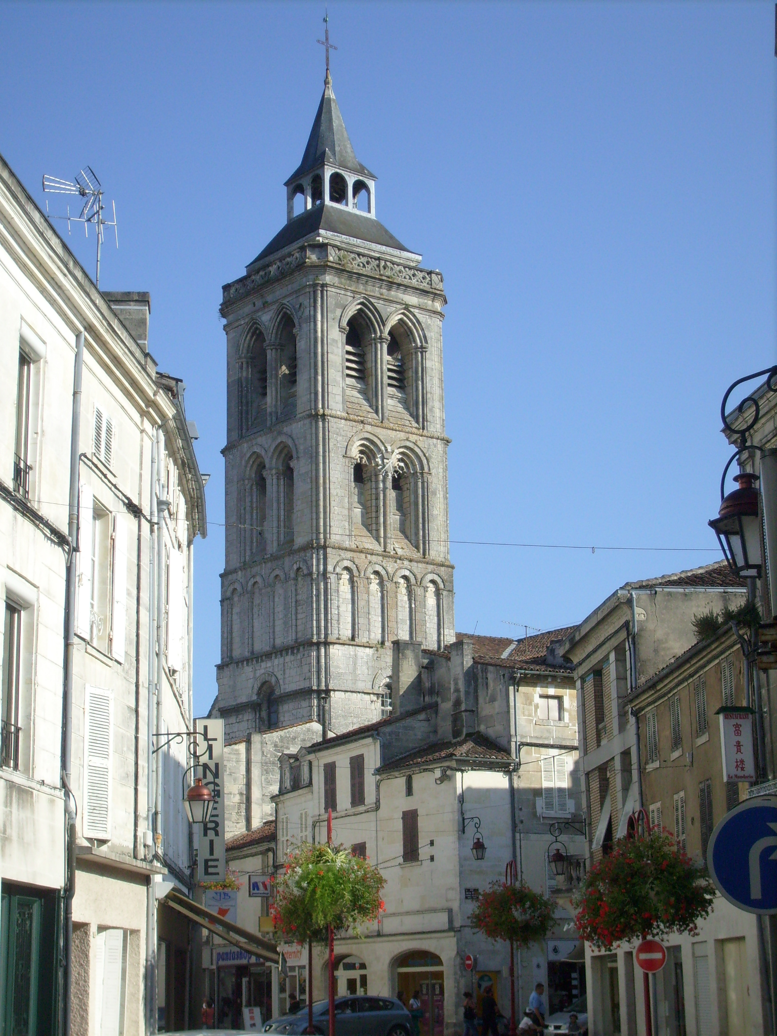 Le centre historique de Cognac, dominé par le clocher de l'église Saint-Léger